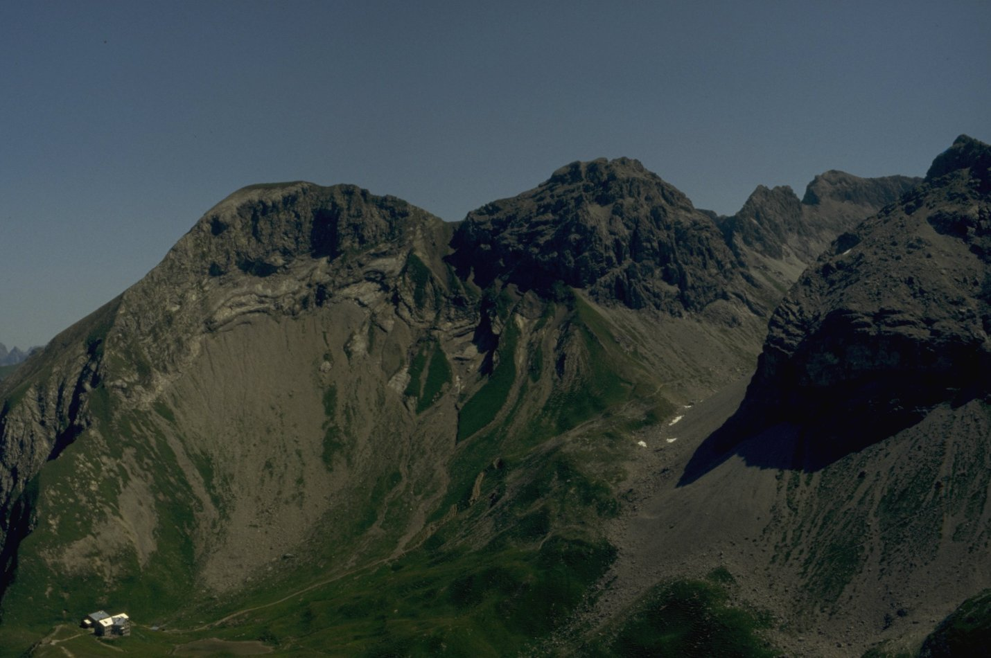 Linkerskopf (links) und Rotgundspitze vom Rappenköpfle.